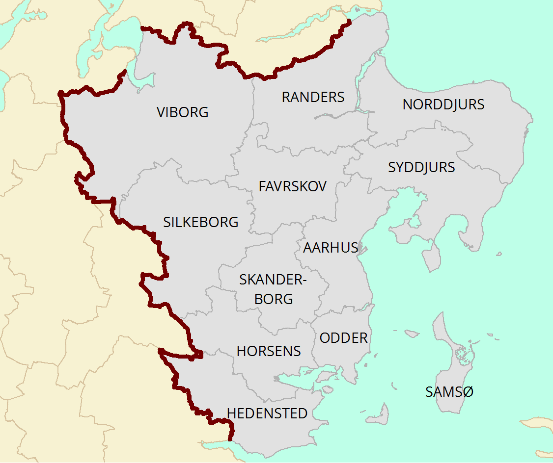 Kort over medlemskommuner i Byregion Aarhus eller Business Region Aarhus baseret på data fra Geodatastyrelsen